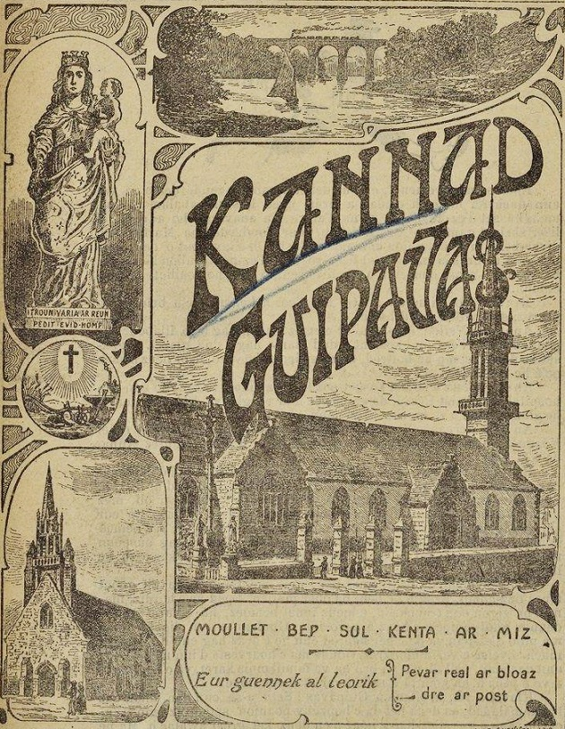 Page de couverture du Bulletin paroissial de Guipavas en 1915 (dessins de Louis Le Guennec représentant l'église paroissiale, Notre-Dame-du-Reun, le viaduc ferroviaire)